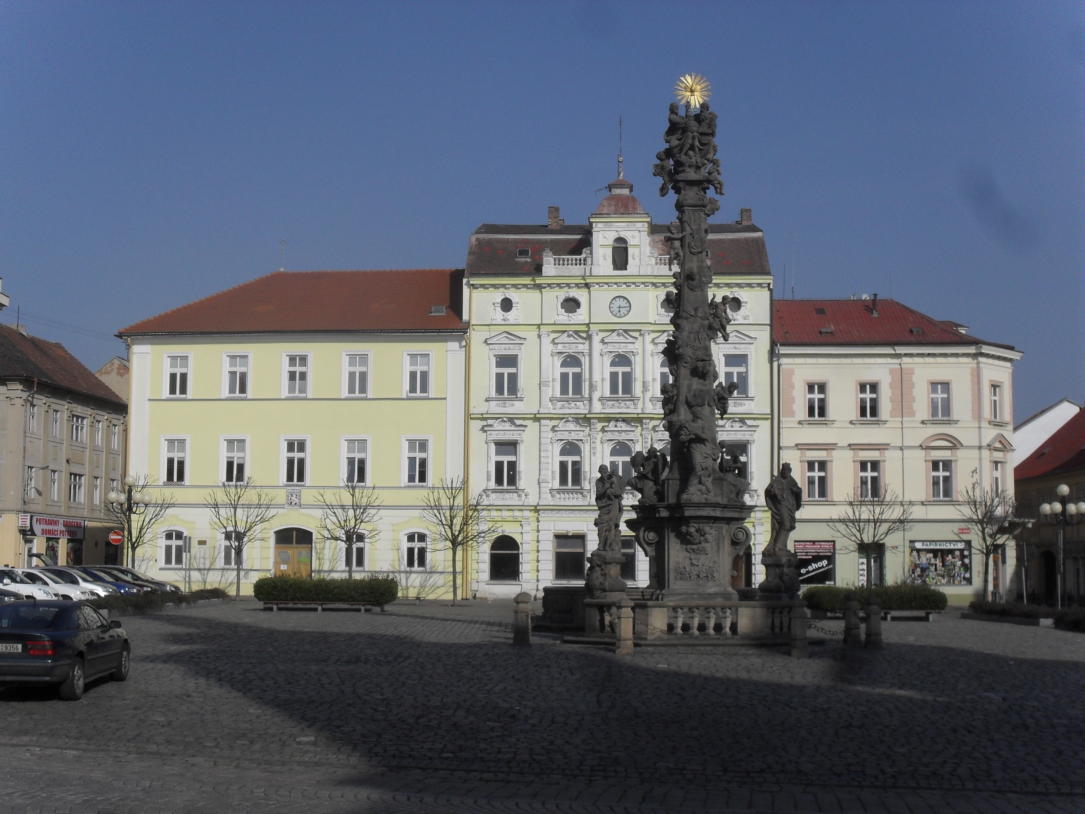 Duchcov, morový sloup, nám. Republiky 1/1, 13/2, 12/3.